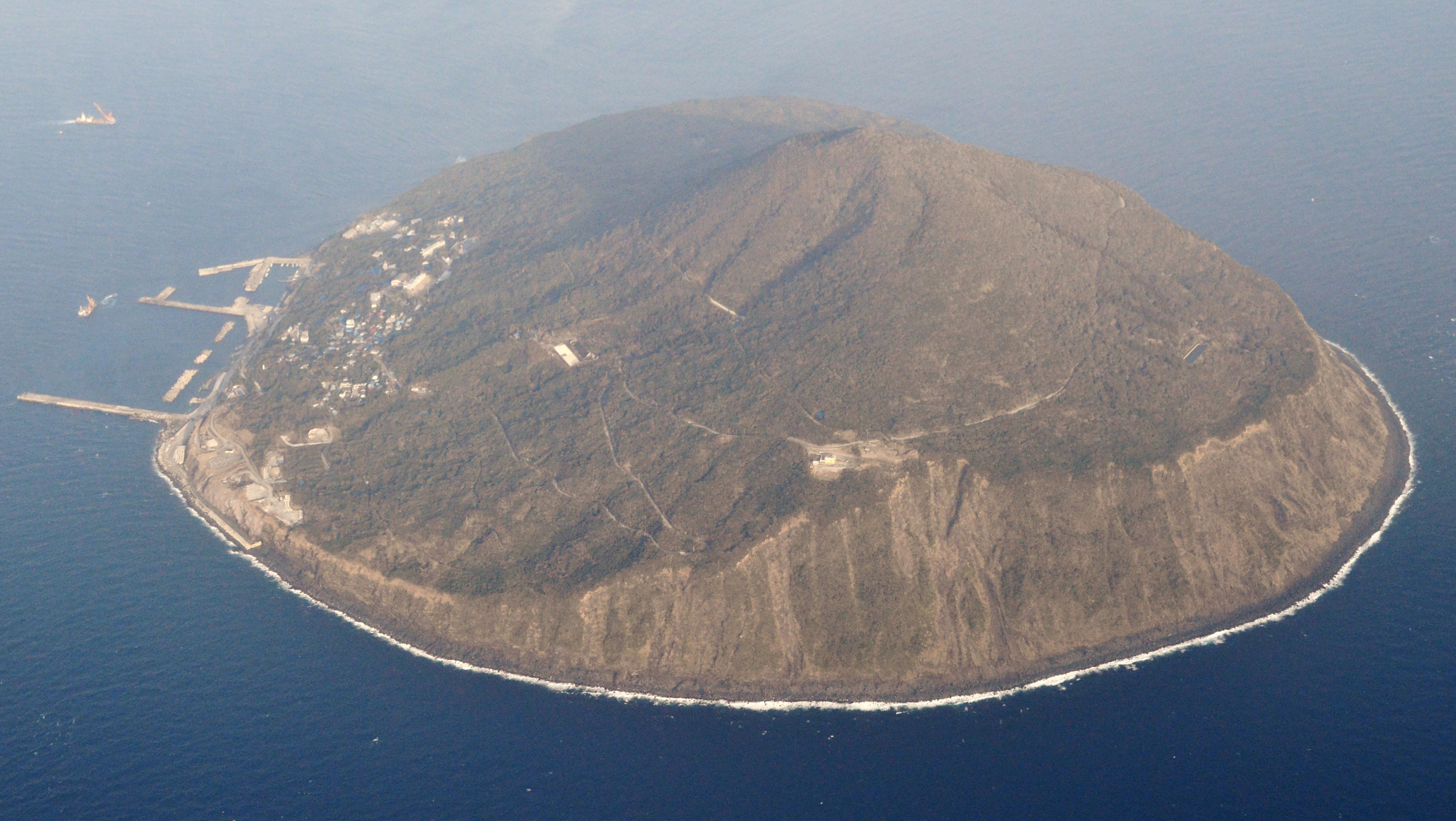 利島 全景